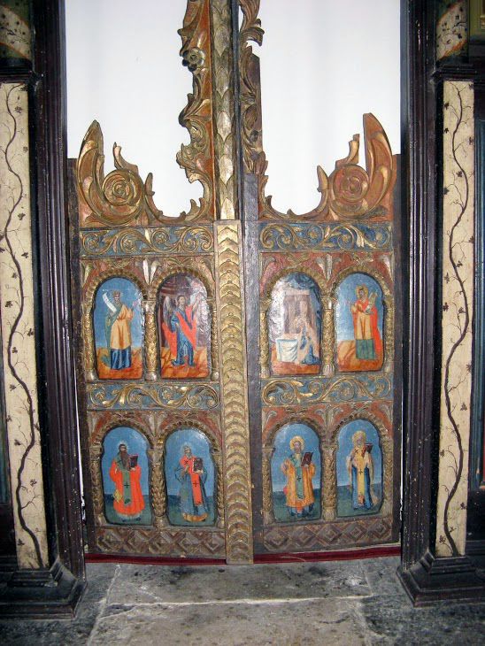 Manastirea Plataresti - Uşile Împărăteşti